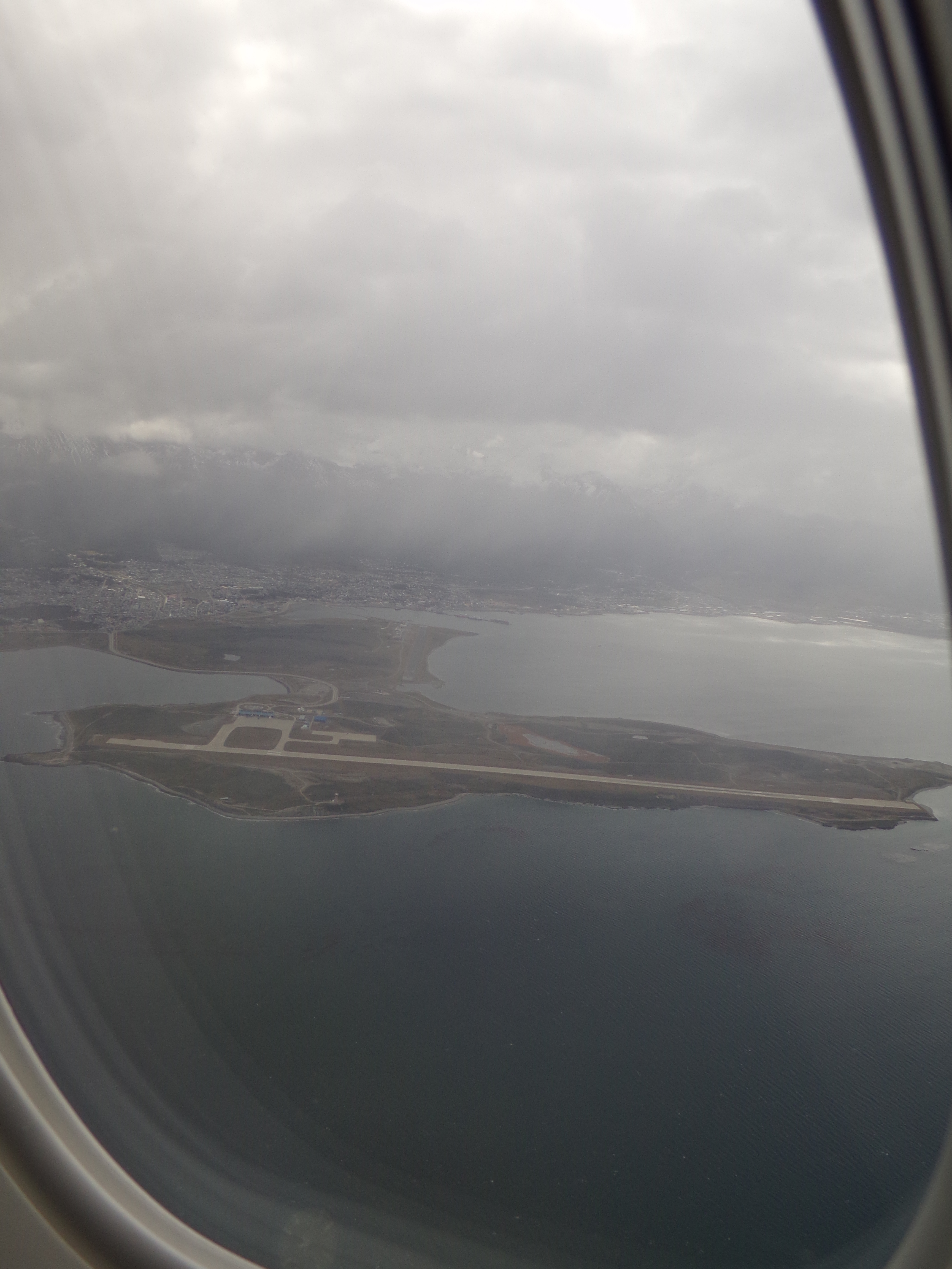 Peninsula Ushuaia